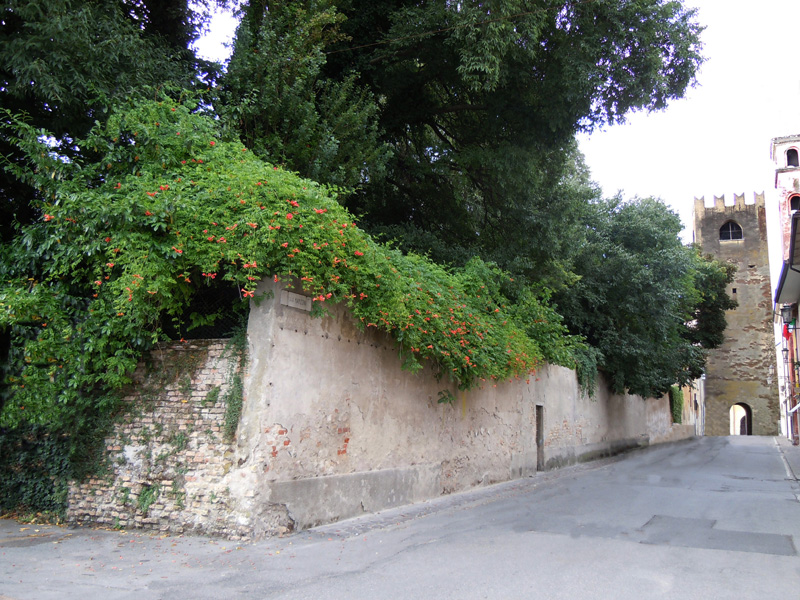 Castel Goffredo, Via Manzoni con tratto di mura difensive.